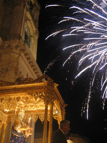 L'uscita della Madonna della Provvidenza dalla Chiesa Madre - Zafferana Etnea (CT) - Foto D. Pennisi